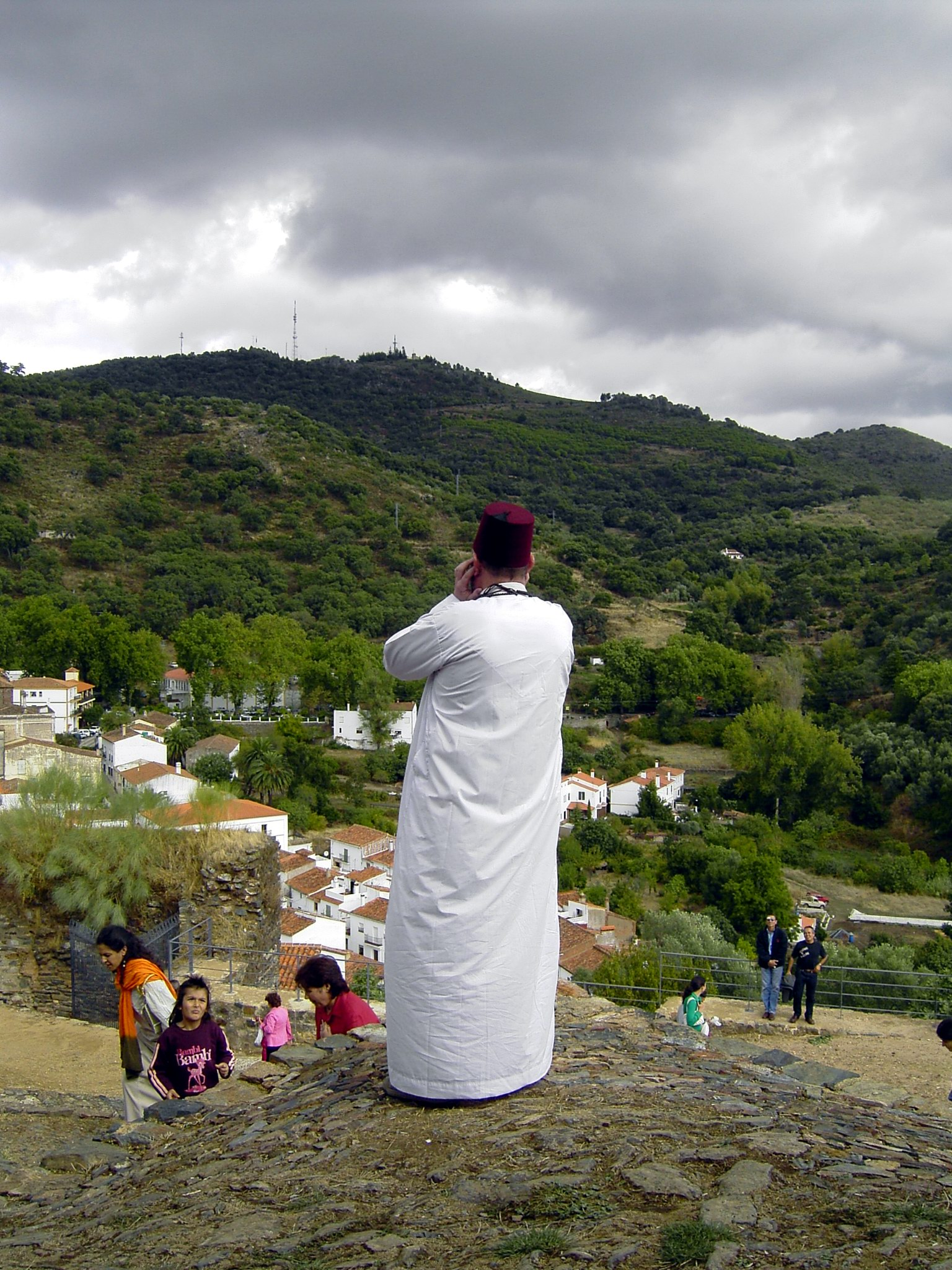 Almuédano llamando a la oración en la Mezquita iglesia de Almonaster la Real. Huelva (España)